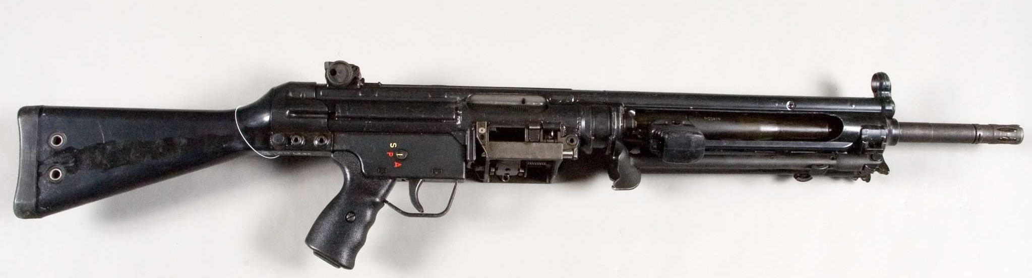 Kulspruta, lätt, HK 21 A1.Helautomatiskt, luftkylt vapen med ammunition bandad i ksp/58 band. Pipan har benstöd och kan snabbt bytas ut. Kolven av konstmassa (plast). Tillv. på försök till beväpning av hemvärnet, ej fastställd modell, för svensk räkning i 21 exemplar. Kaliber 7,62x51 mm. Mekanisk eldhastighet